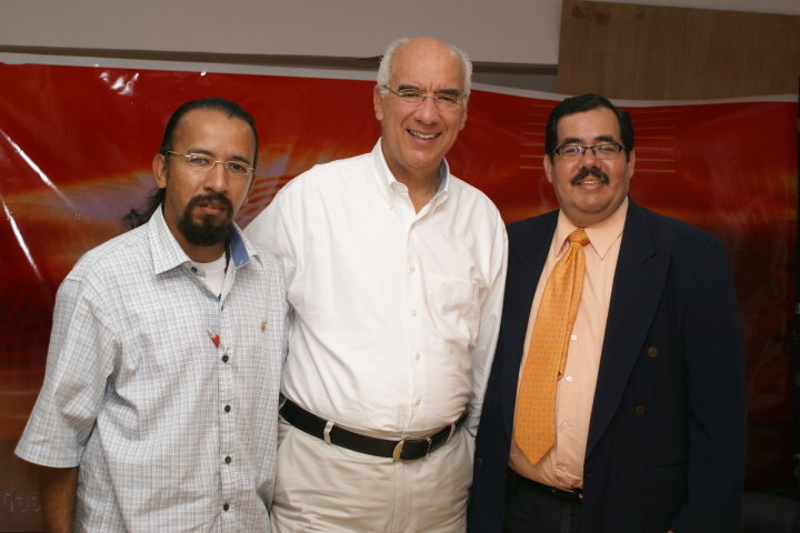 En El Estudio de Televisión de 7 Días, Raúl Díaz Cruz, Director , Jorge Oliva, jefe de Redacción y Dante Delgado, Candidato .